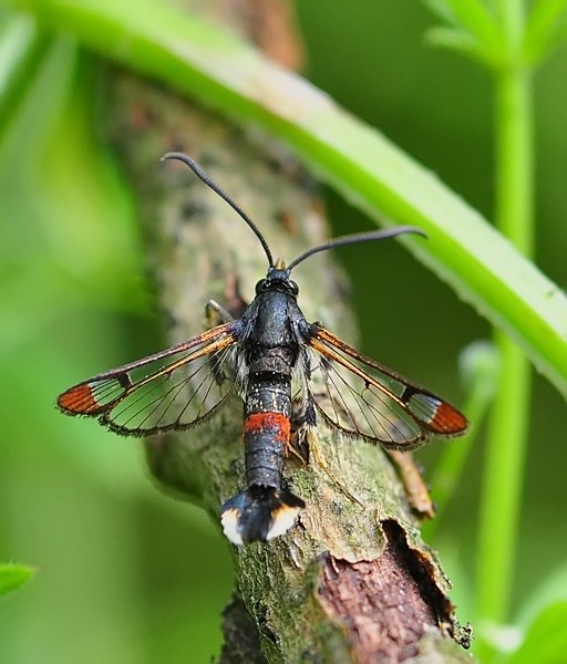 Wilgenwespvlinder (Synanthedon formicaeformis))